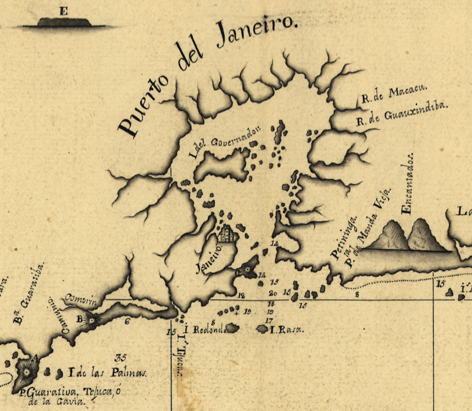 Detalle de la carta esférica de la costa brasileña en la que aparece la bahía de Guanabara y el puerto de Río de Janeiro.